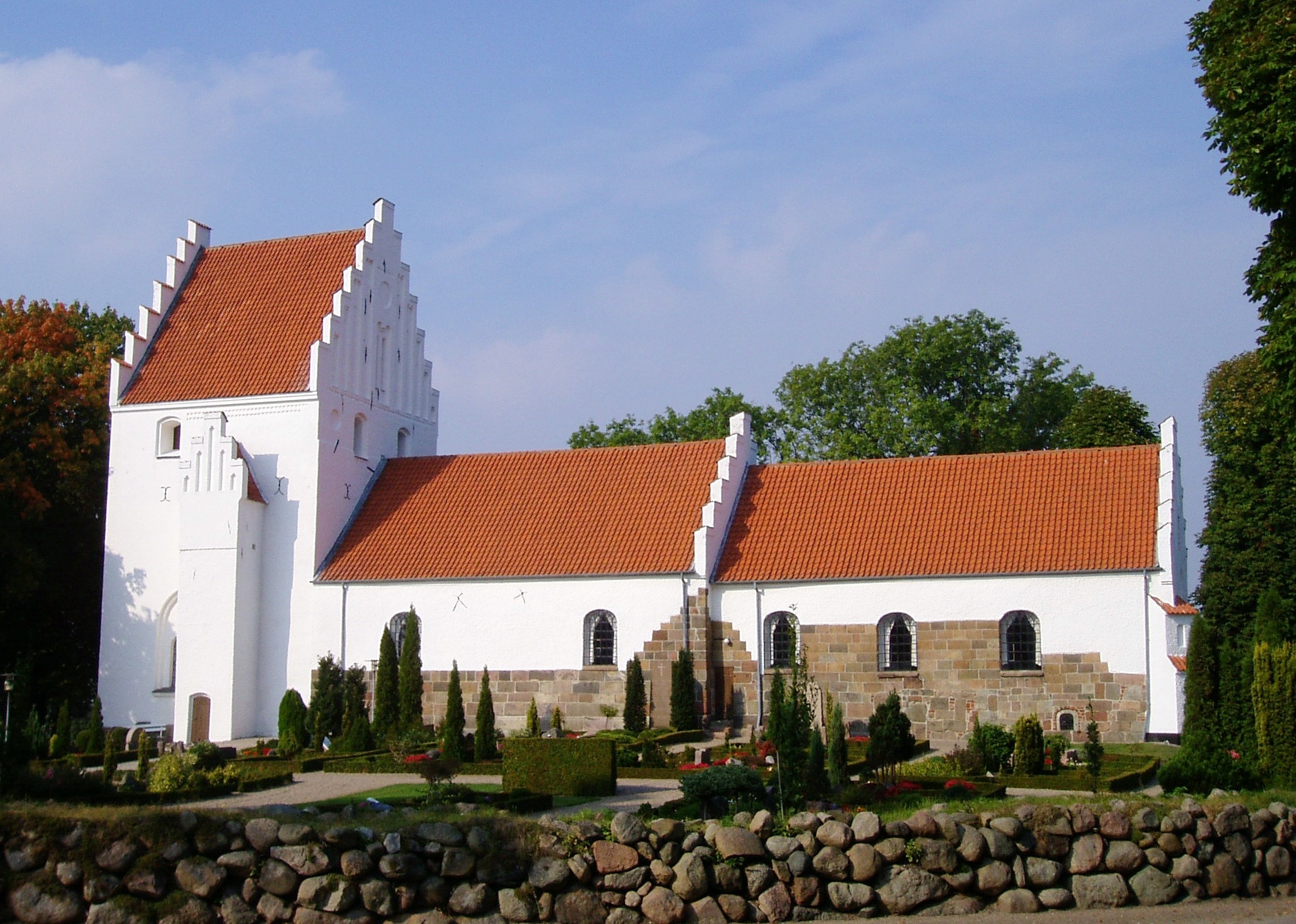 Gislev Kirke, Gislev Sogn, Ringe Provsti, Fyns Stift.